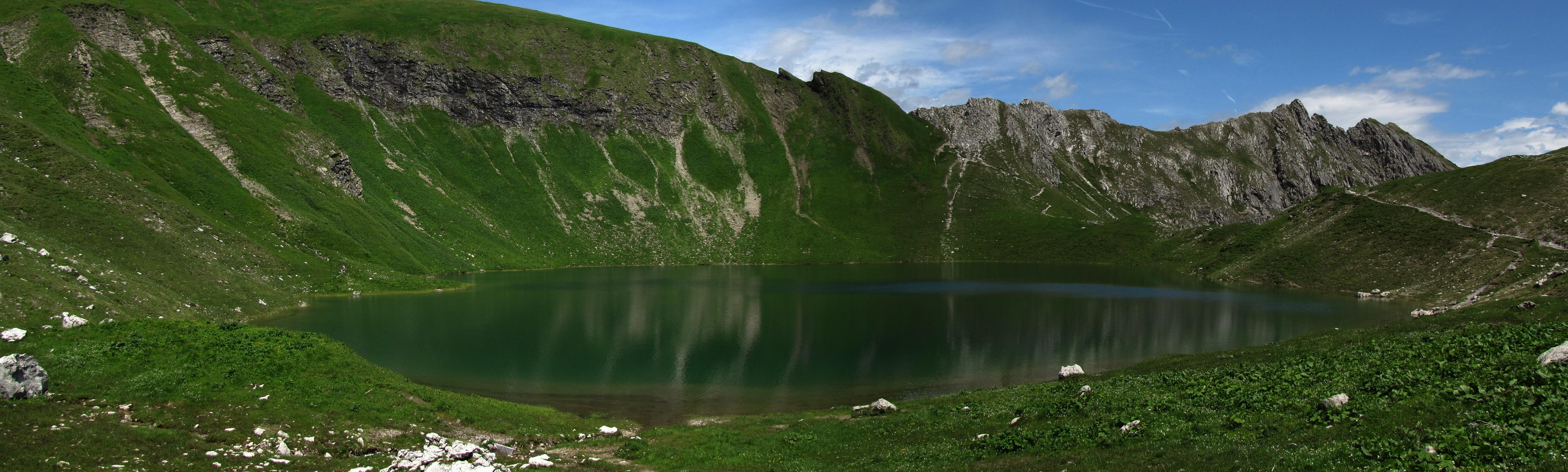 Blick aus Südwesten über den Engeratsgundsee (1876 m) hinüber zum Hengst (1989 m).